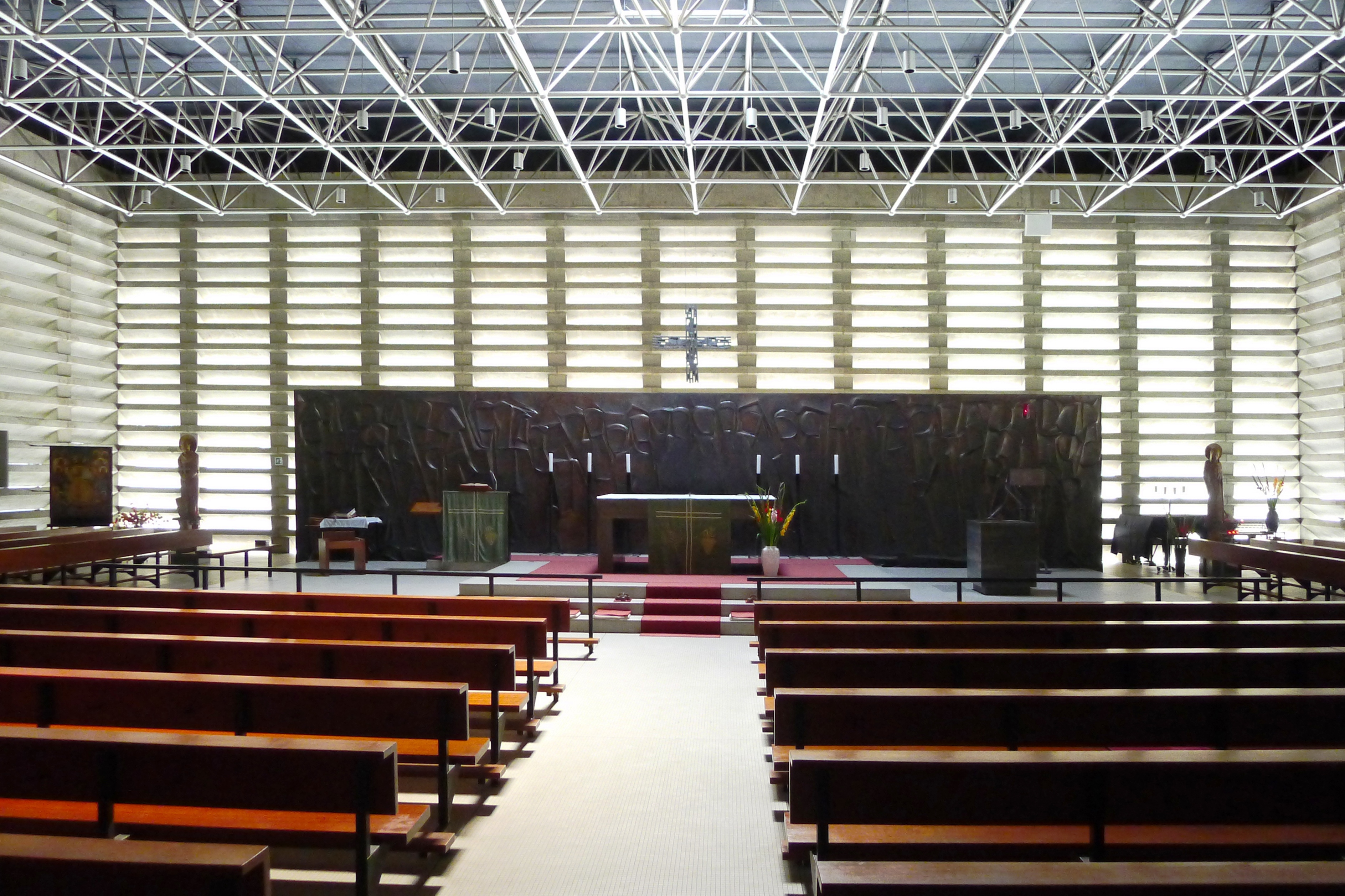 Kirchsaal